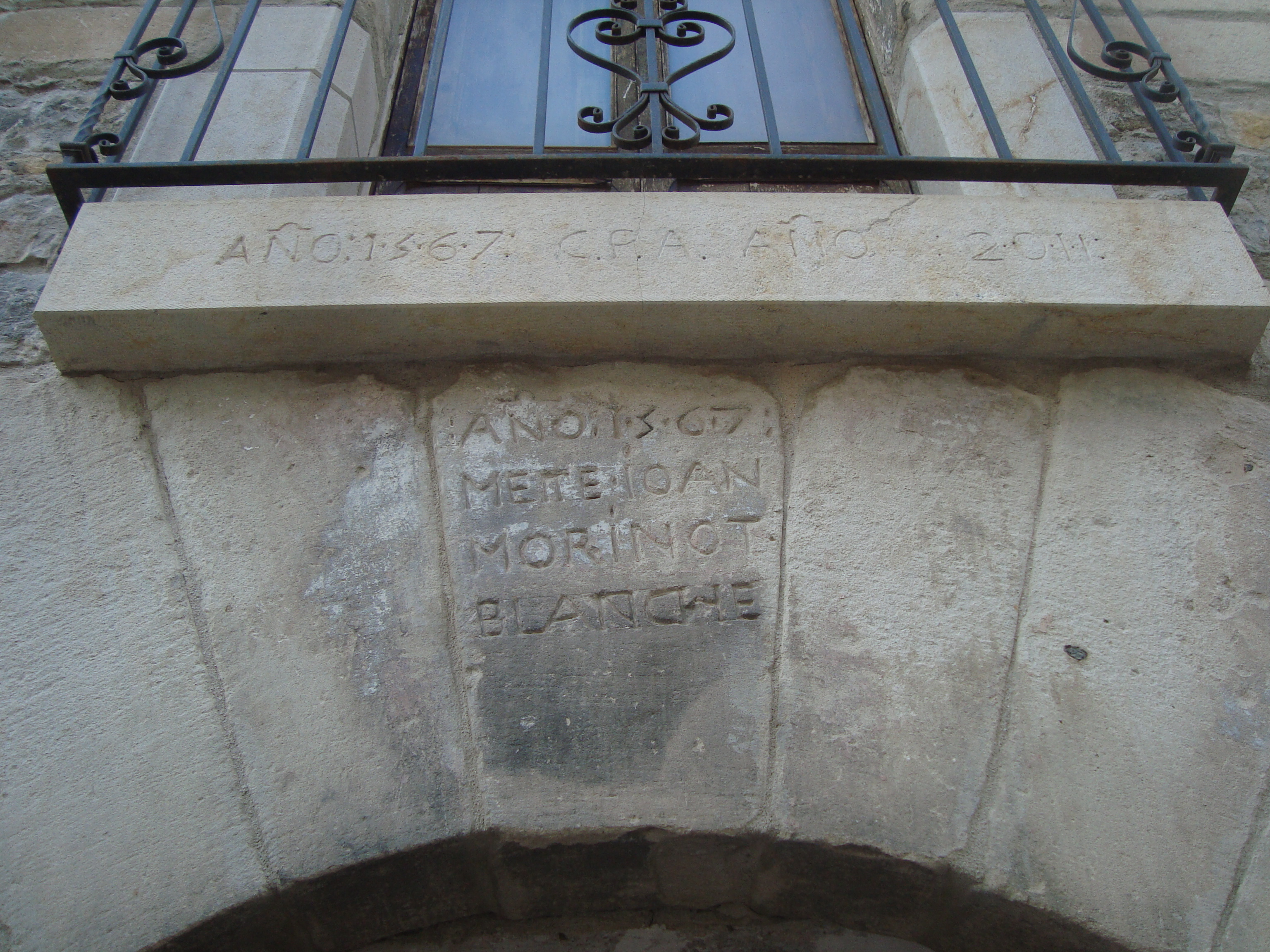 Villarroya de los Pinares (Teruel). Dovela central con grabado.